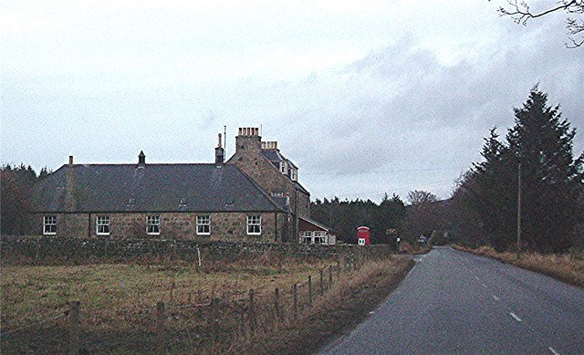 Kildrummy Inn, Kildrummy, Aberdeenshire